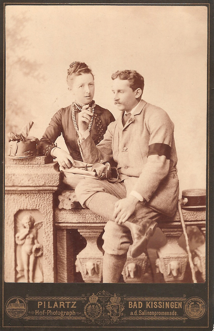 Arthur Evans (1851 - 1941) with his wife Margaret (nee Freeman, 1848 - 1893) in 1888